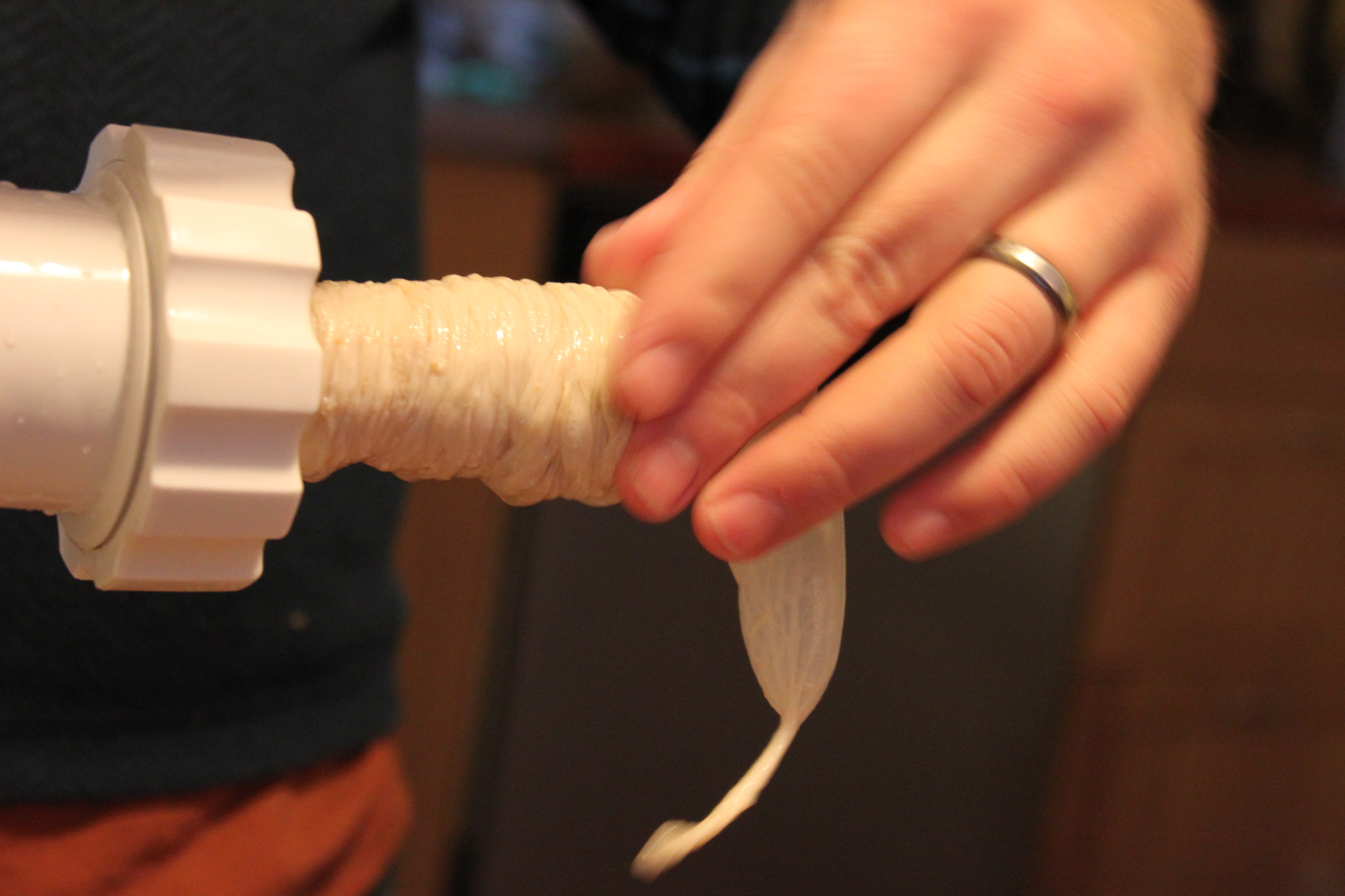 sausage making tutorial on